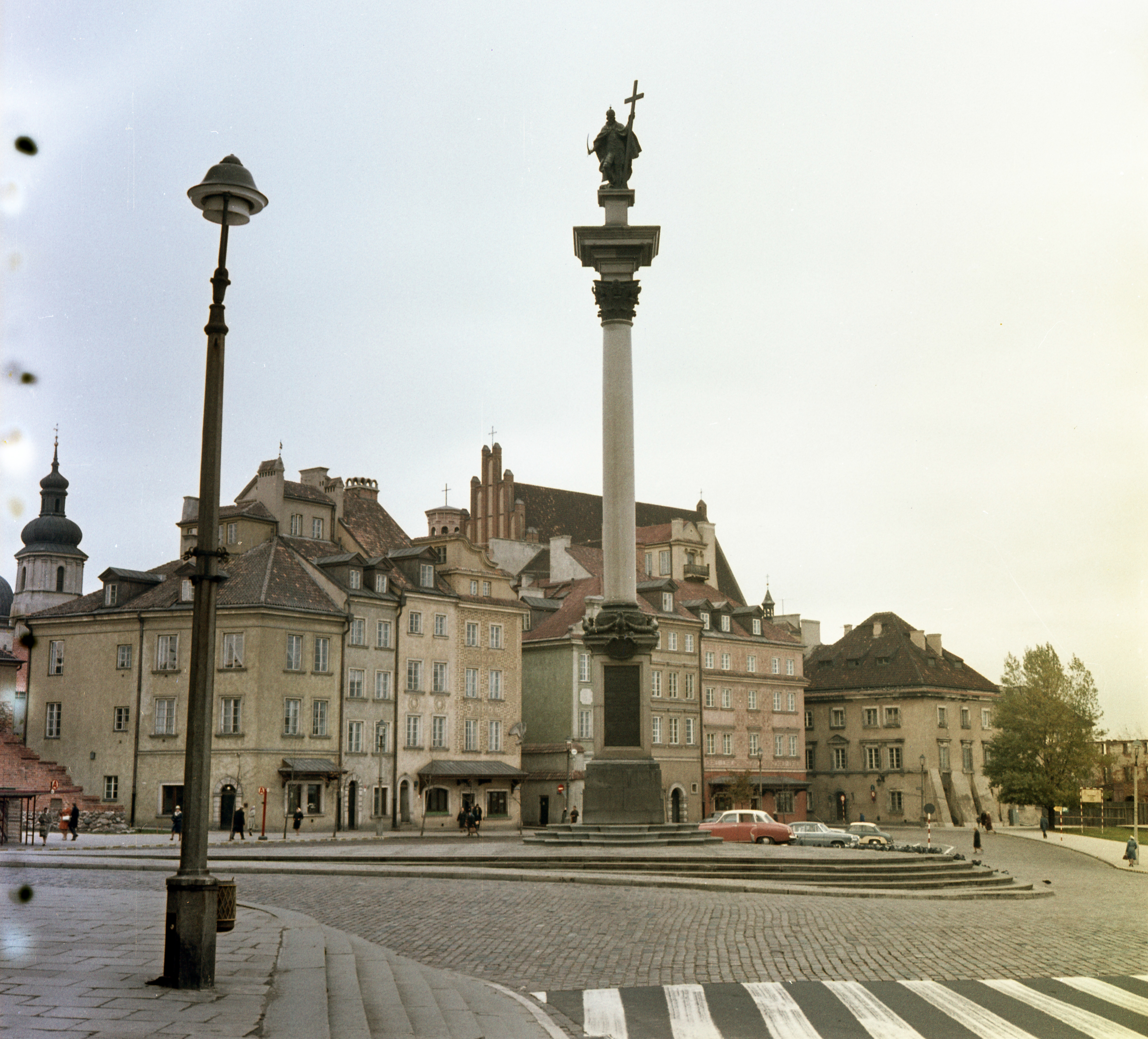 Plac Zamkowy, Zsigmond-oszlop. Location: Poland, Warsaw Tags: colorful Title: Plac Zamkowy, Zsigmond-oszlop.